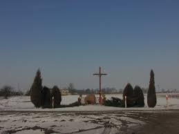 Jest to kamień podarowany 50 lat temu przez opoczyńskich mieszkańców Radłówka